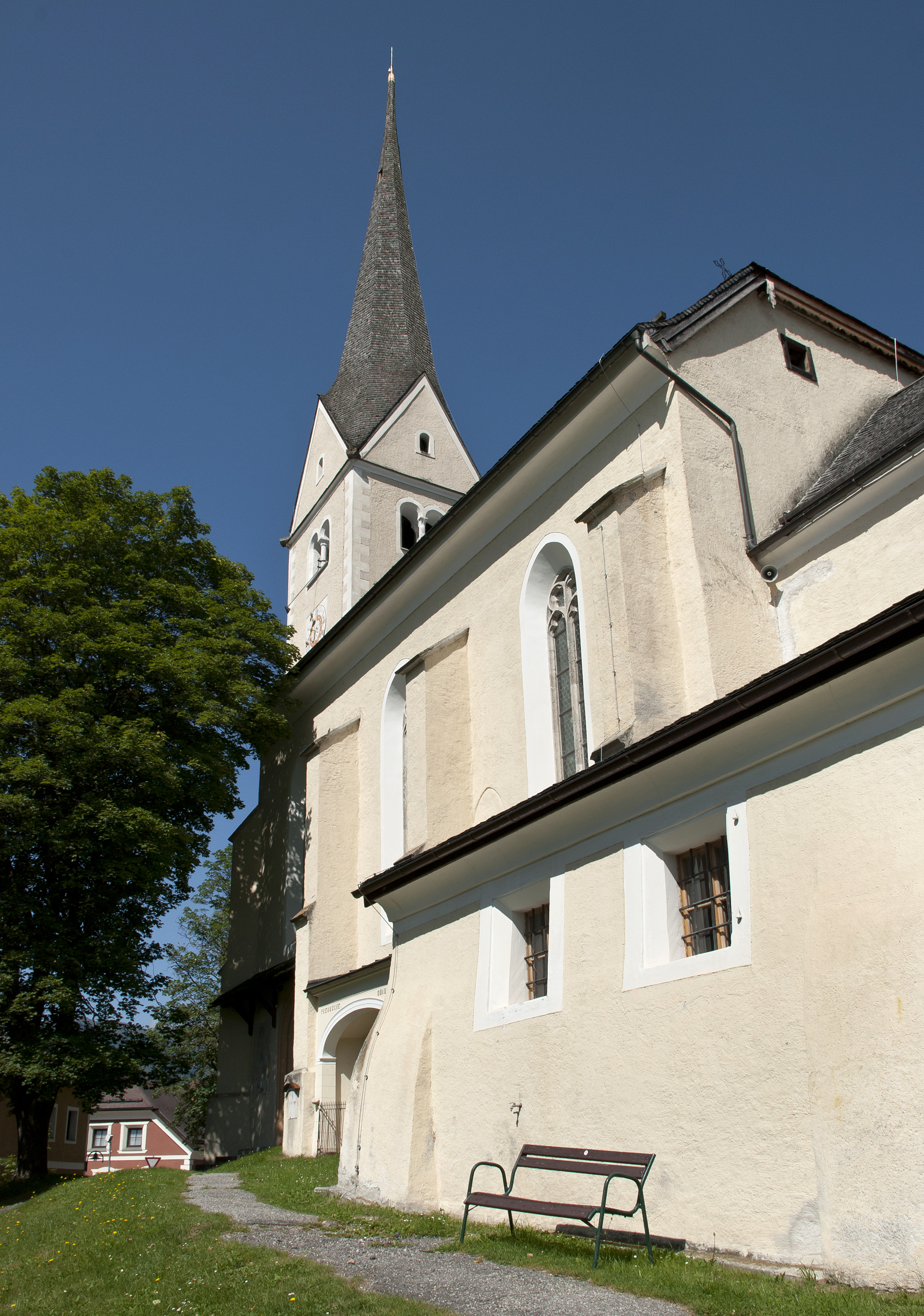 Kath. Pfarrkirche hl. Michael 5582 St. Michael im Lungau